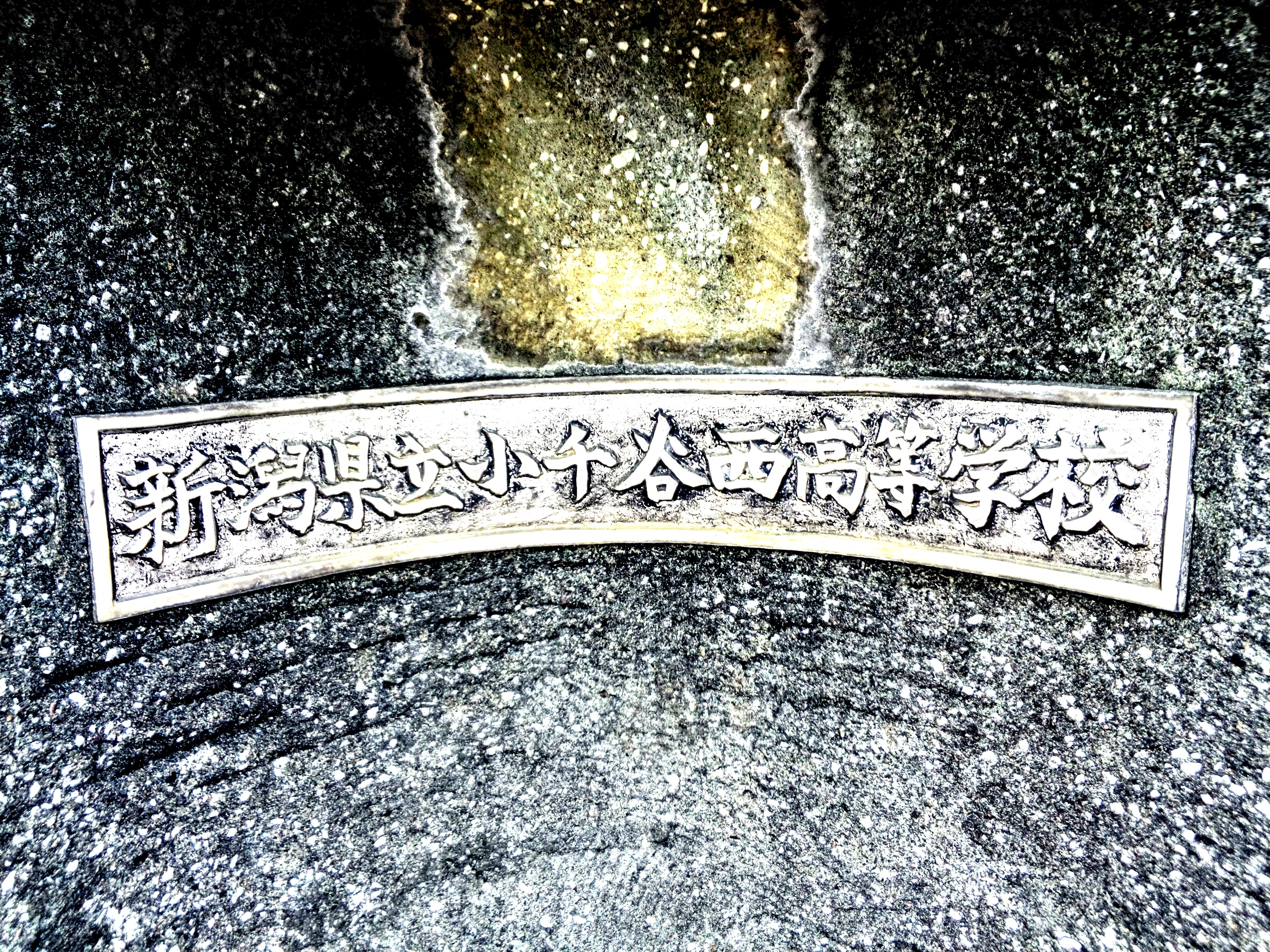 小千谷西高校・学校表示